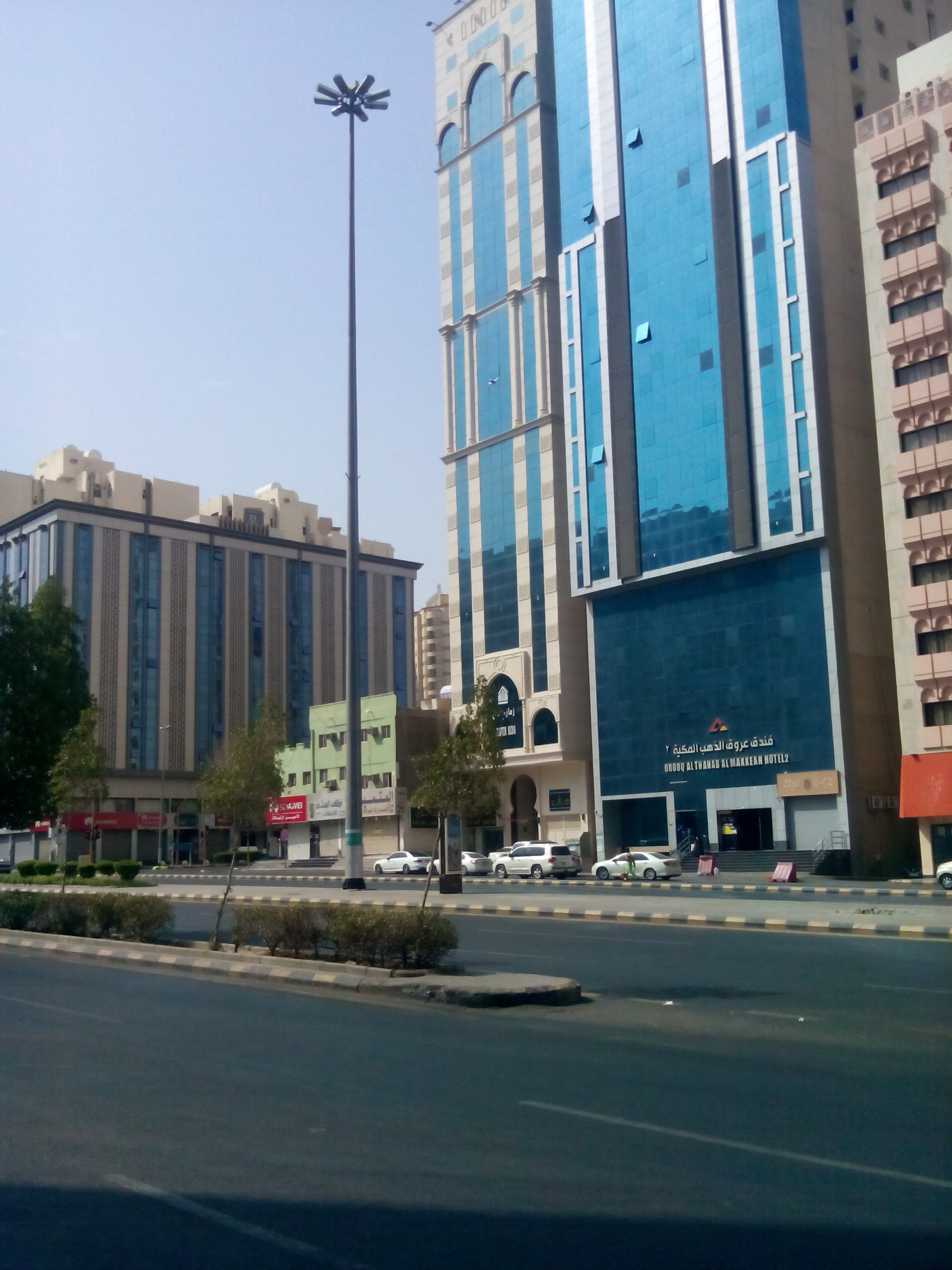 شارع في حي العزيزية في مدينة مكة 2018